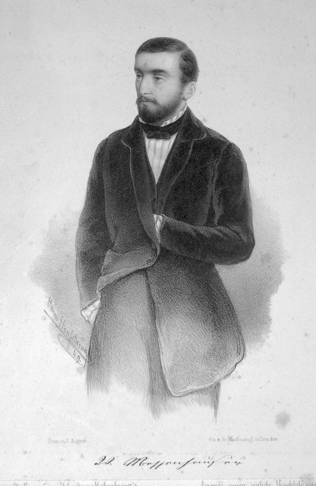 Cäsar Wenzel Messenhauser, Lithographie von Johann (Hanns) Hanfstängl (1820–1885), 1849